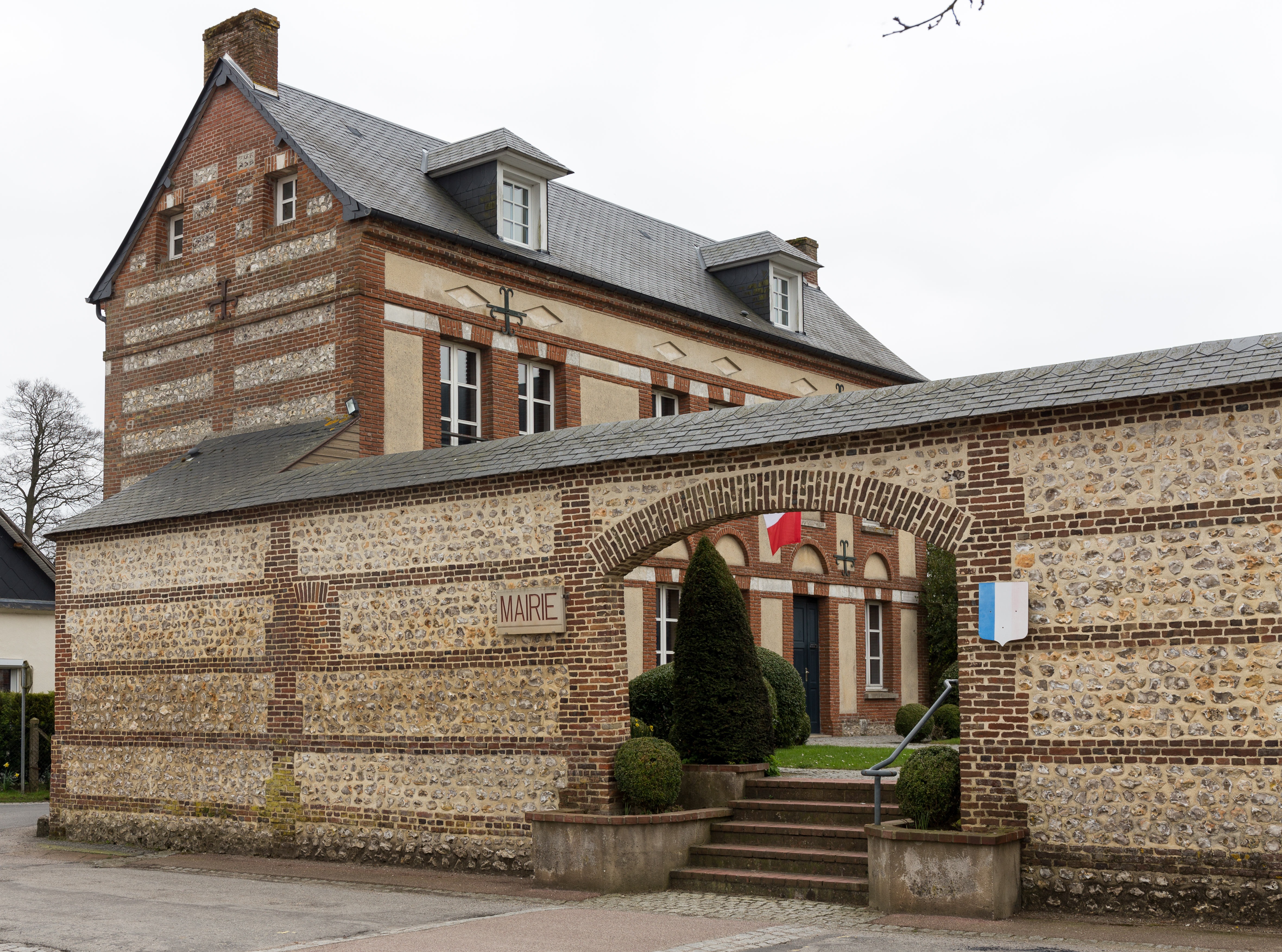 Mairie d'Auberville-la-Campagne, ancien presbytère.